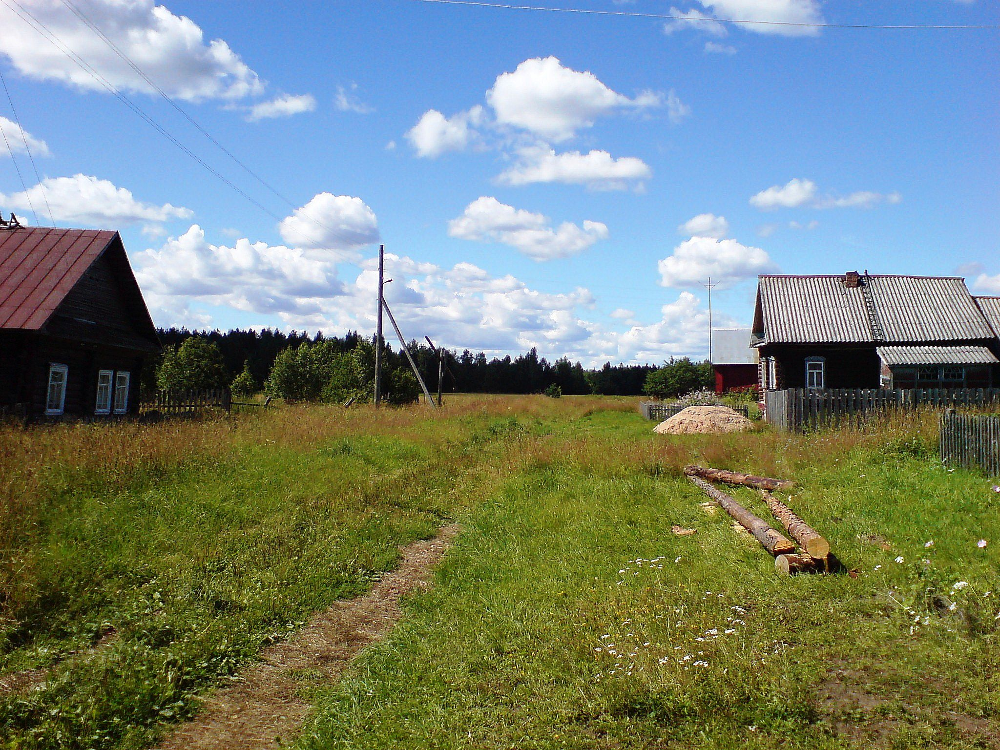 Окулово